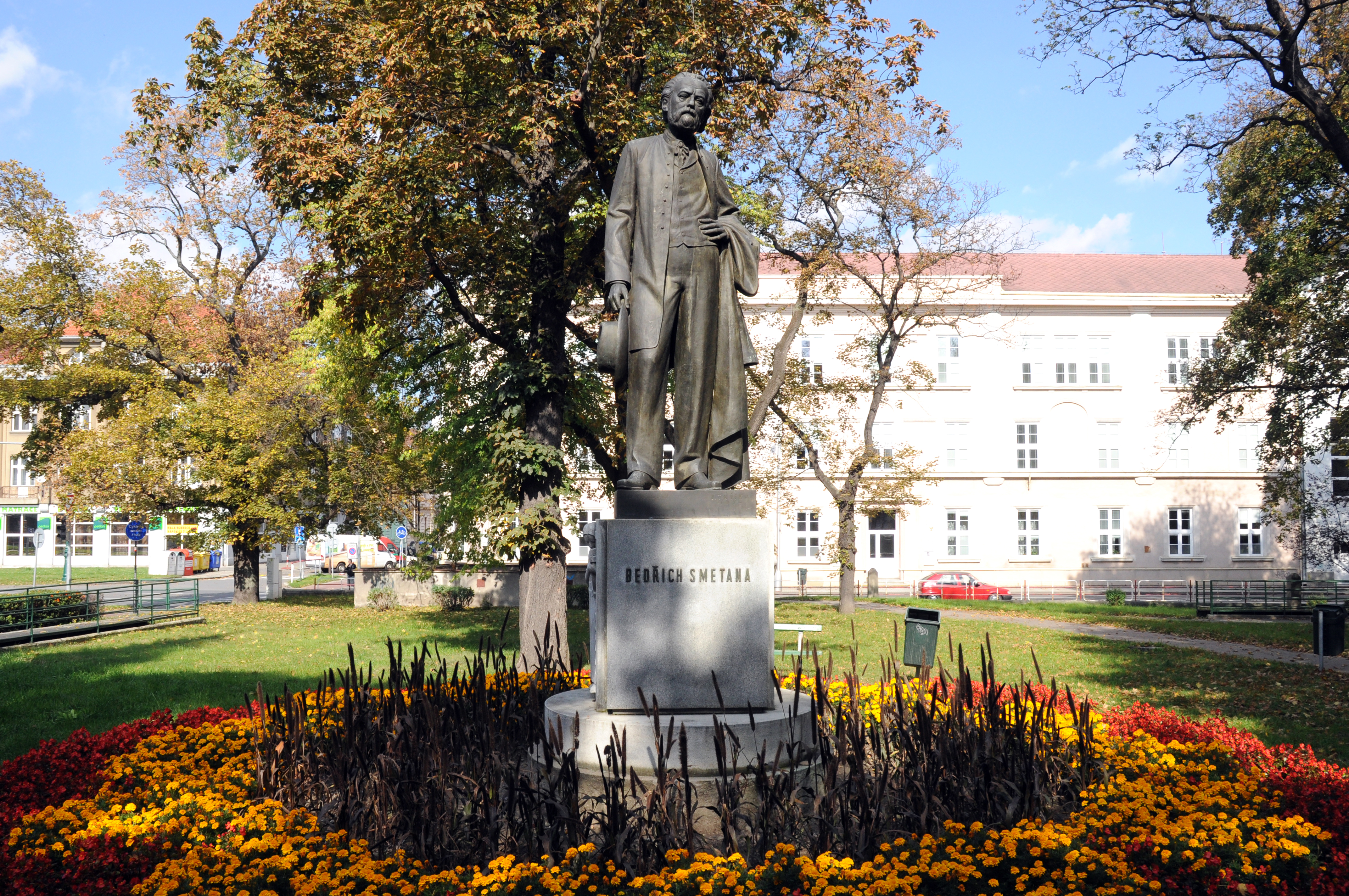 Socha B. Smetany (Prostějov), Smetanovy sady, Prostějov